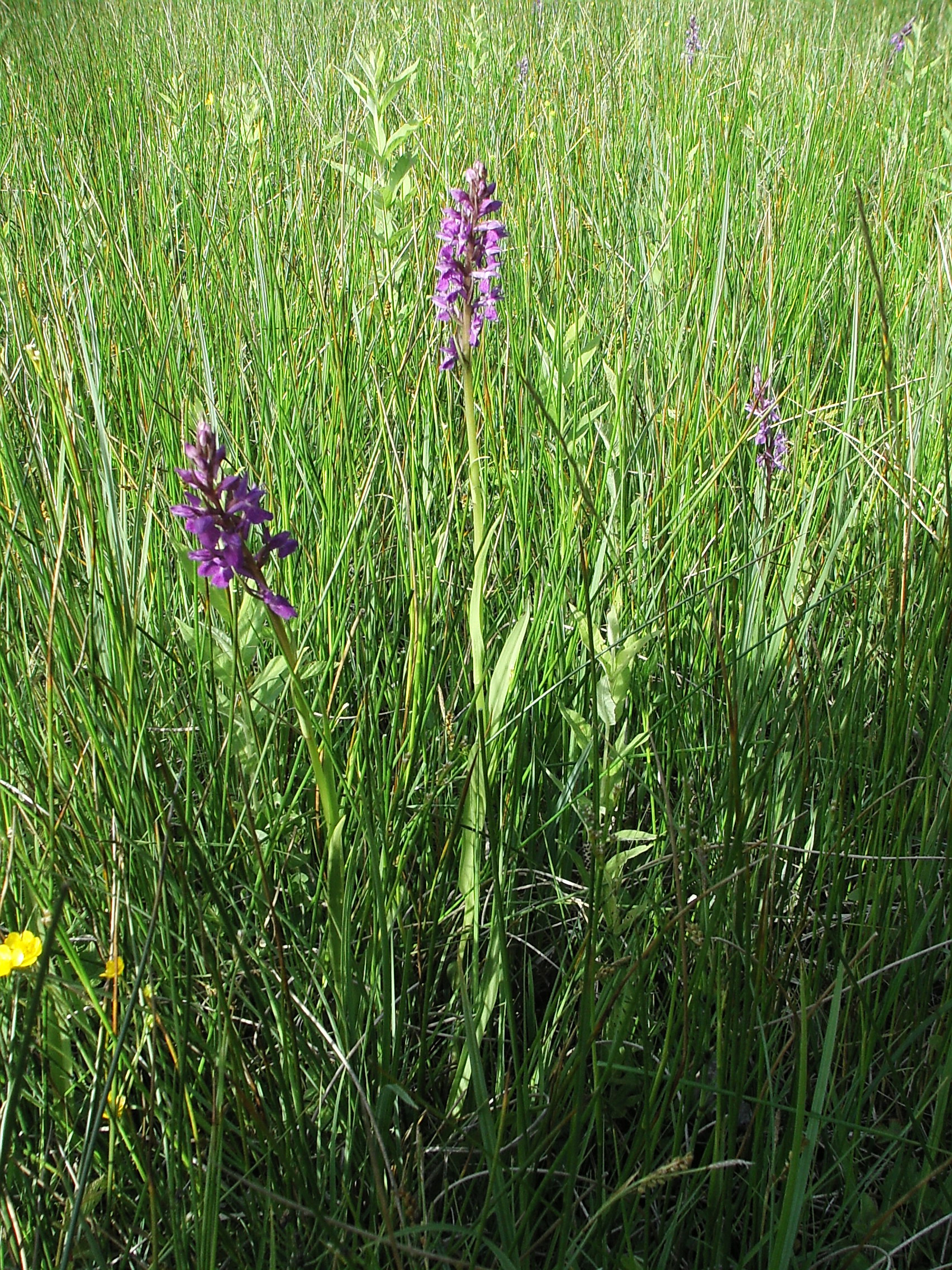 Dactylorhiza elata, Bardenat, Dordogne (France)